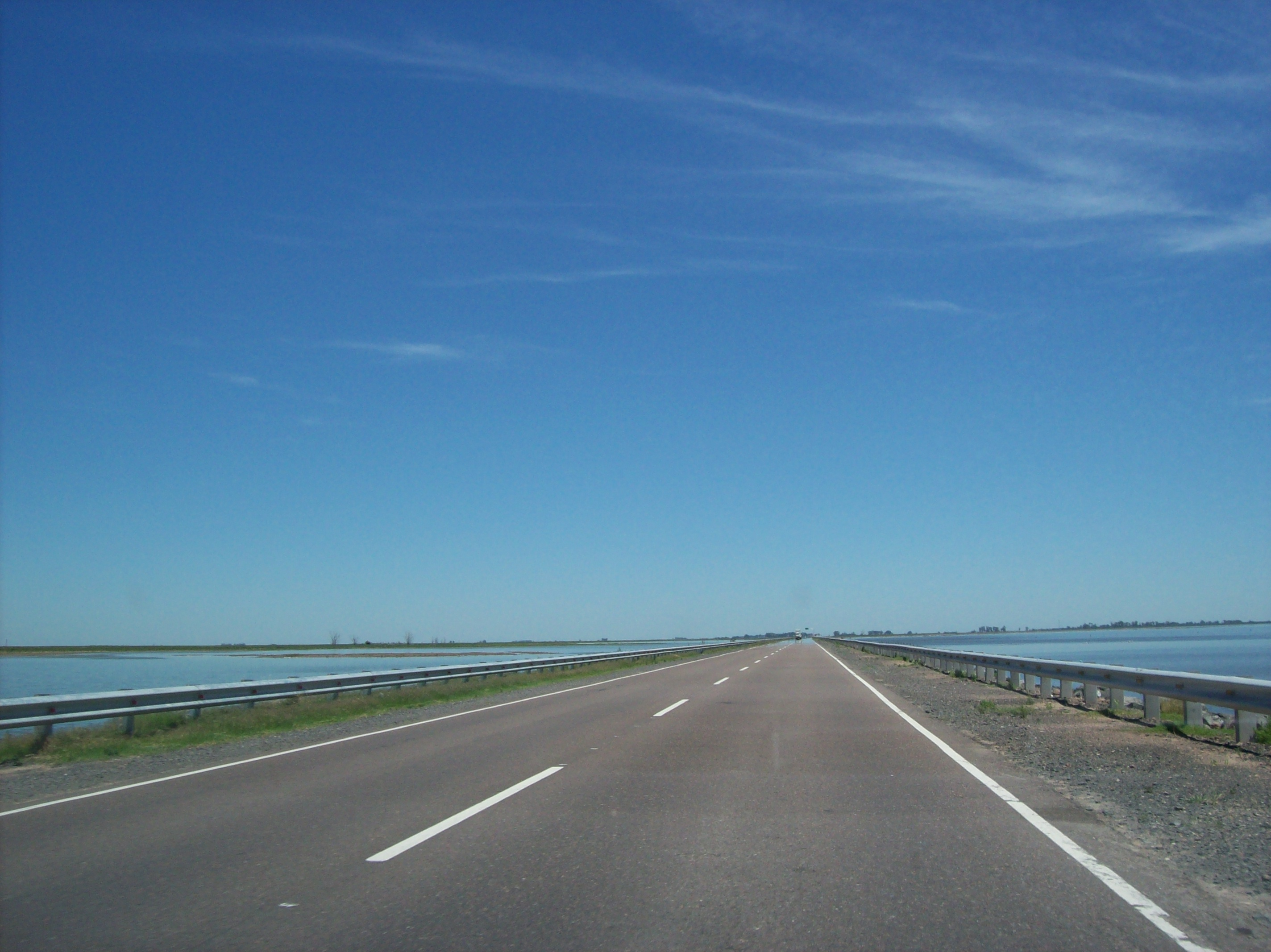 Ruta Nacional 7 km 384 en su paso por la laguna La Picasa, Provincia de Santa Fe, Argentina.